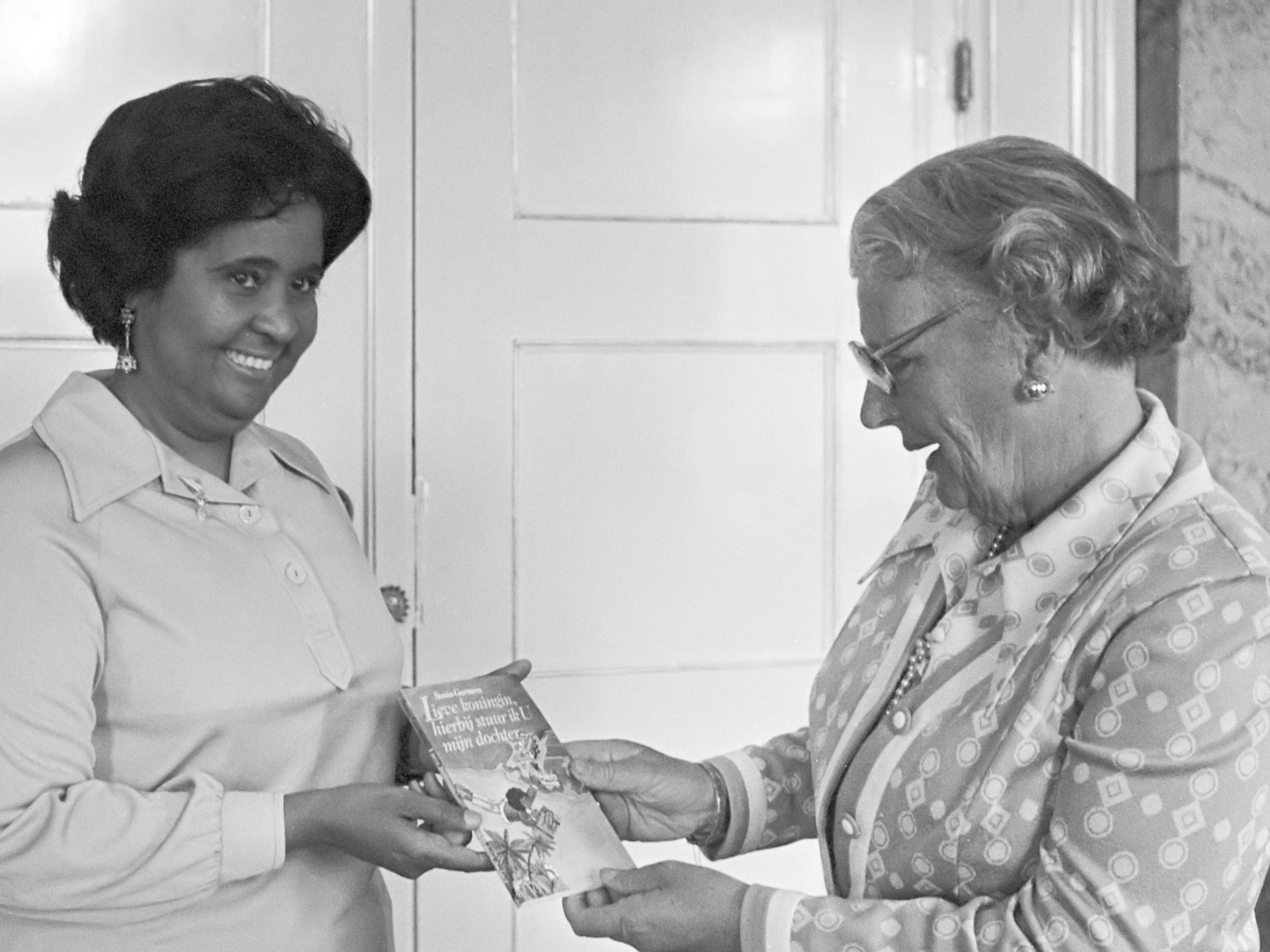 Hare Majesteit krijgt boek van Antilliaanse schrijfster Sonia Garmers op Soestdijk 25 mei 1976